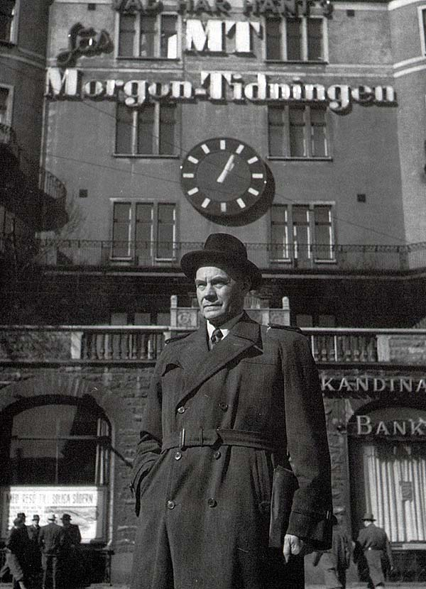 August Lindberg